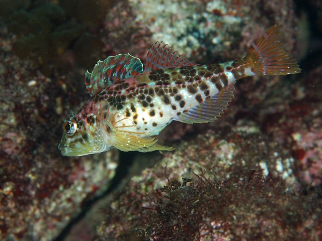 オビアナハゼ Pseudoblennius zonostigma